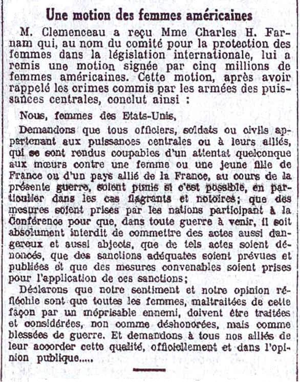 Annonce de la remise à Clemenceau de la motion contre le viol de guerre, paraphée par cinq millions de femmes des États-Unis.